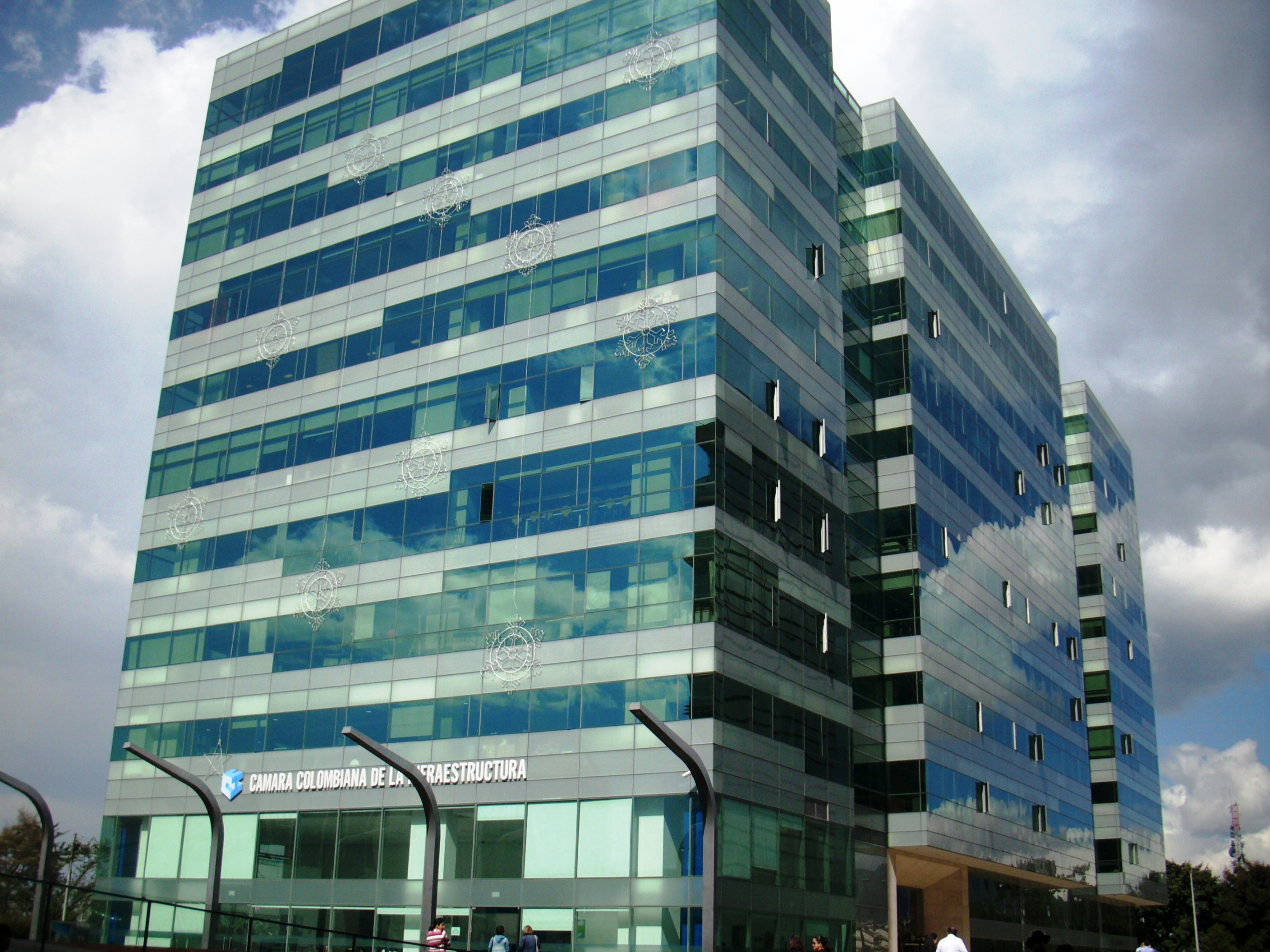 Torre de la Cámara Colombiana de la Infraestructura de la Ciudad Empresarial Sarmiento Angulo